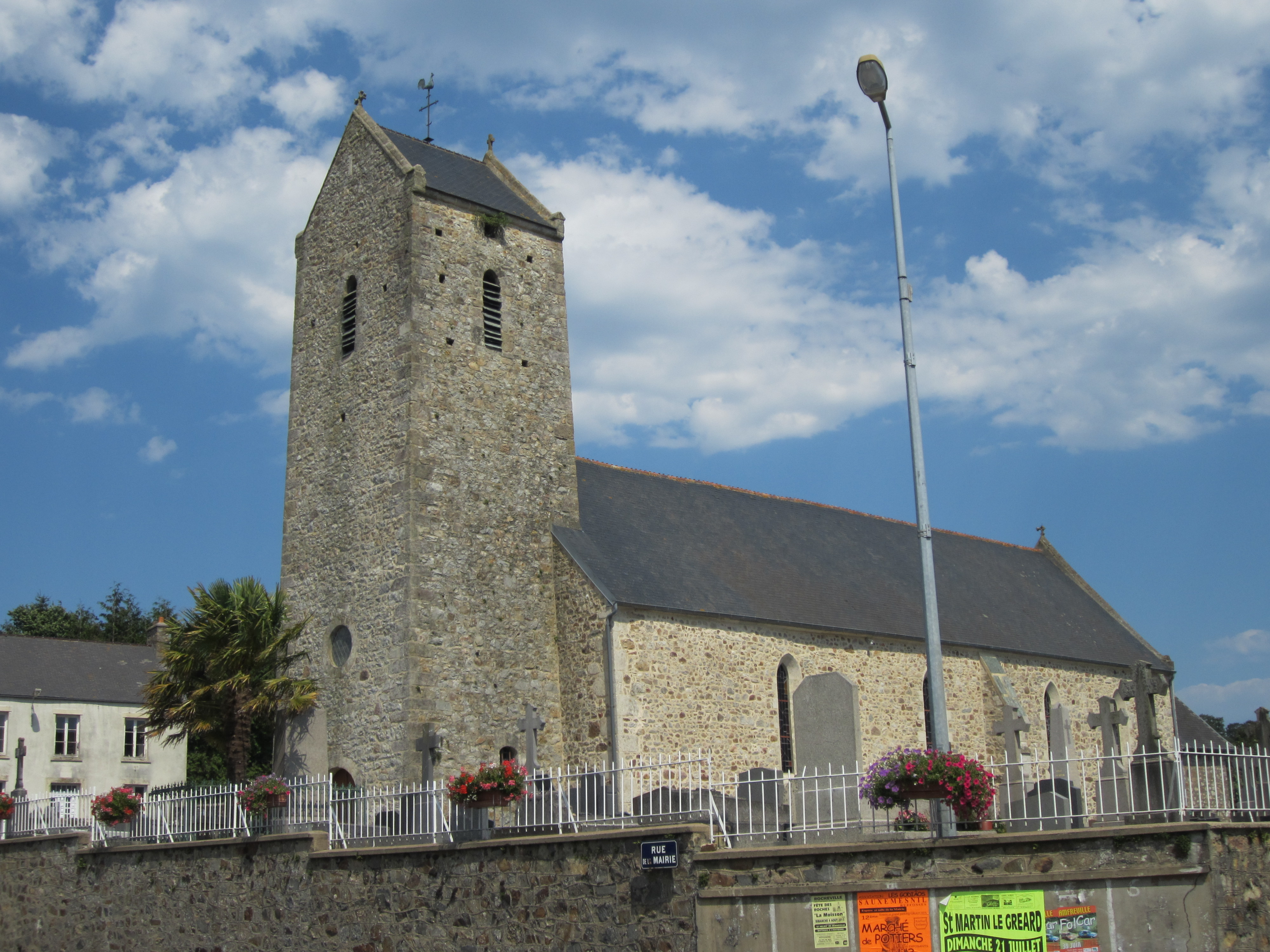 église Saint-Barthélemy d'Hardinvast, Manche